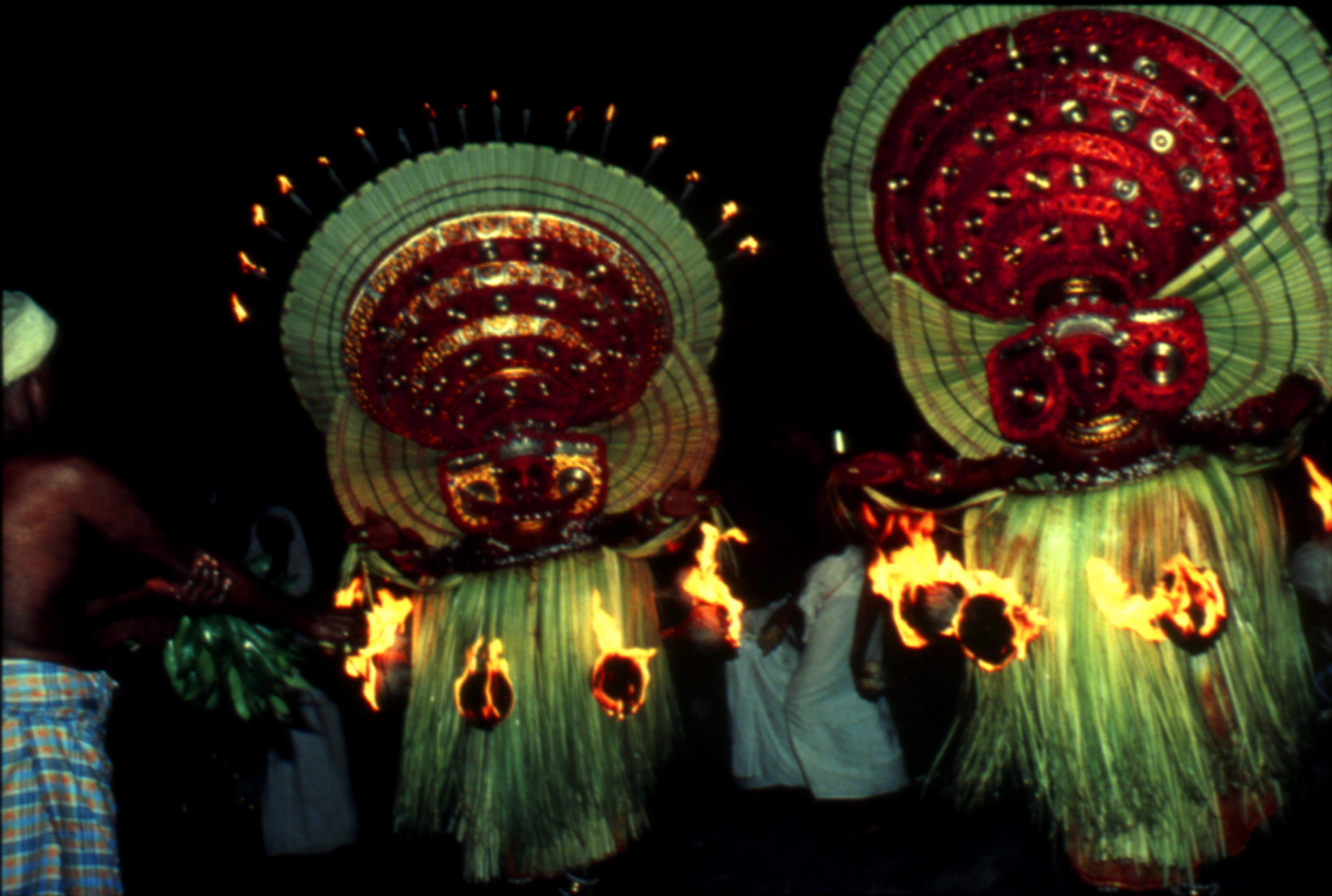 1981 or 1982, Kadamkottu Makkam and Chiru Teyyams.